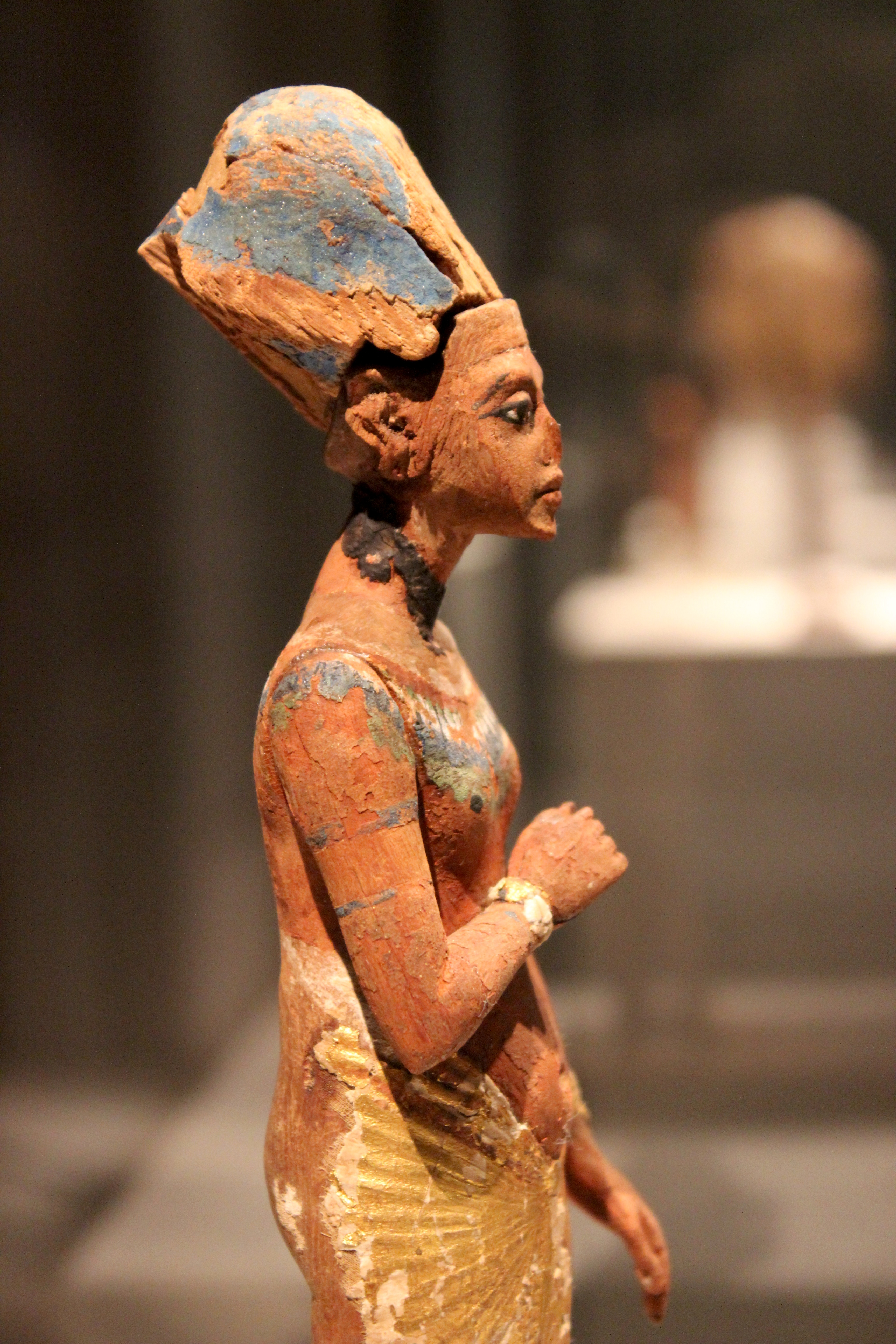 Estatua de Akenatón. Berlín, Neues Museum.